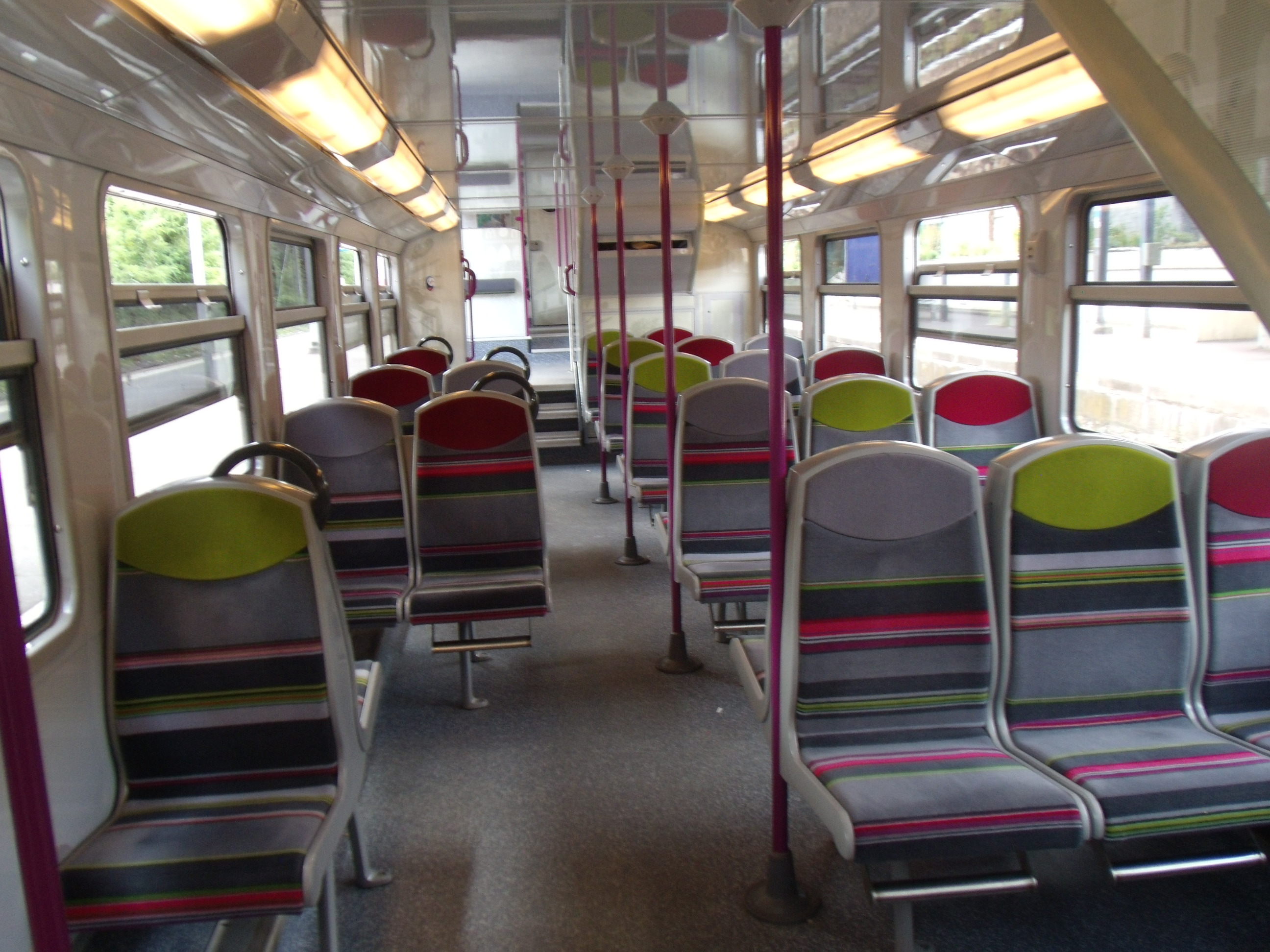 L'intérieur de la salle basse de la Z 20860 en livrée carmillon à Montigny - Beauchamp.